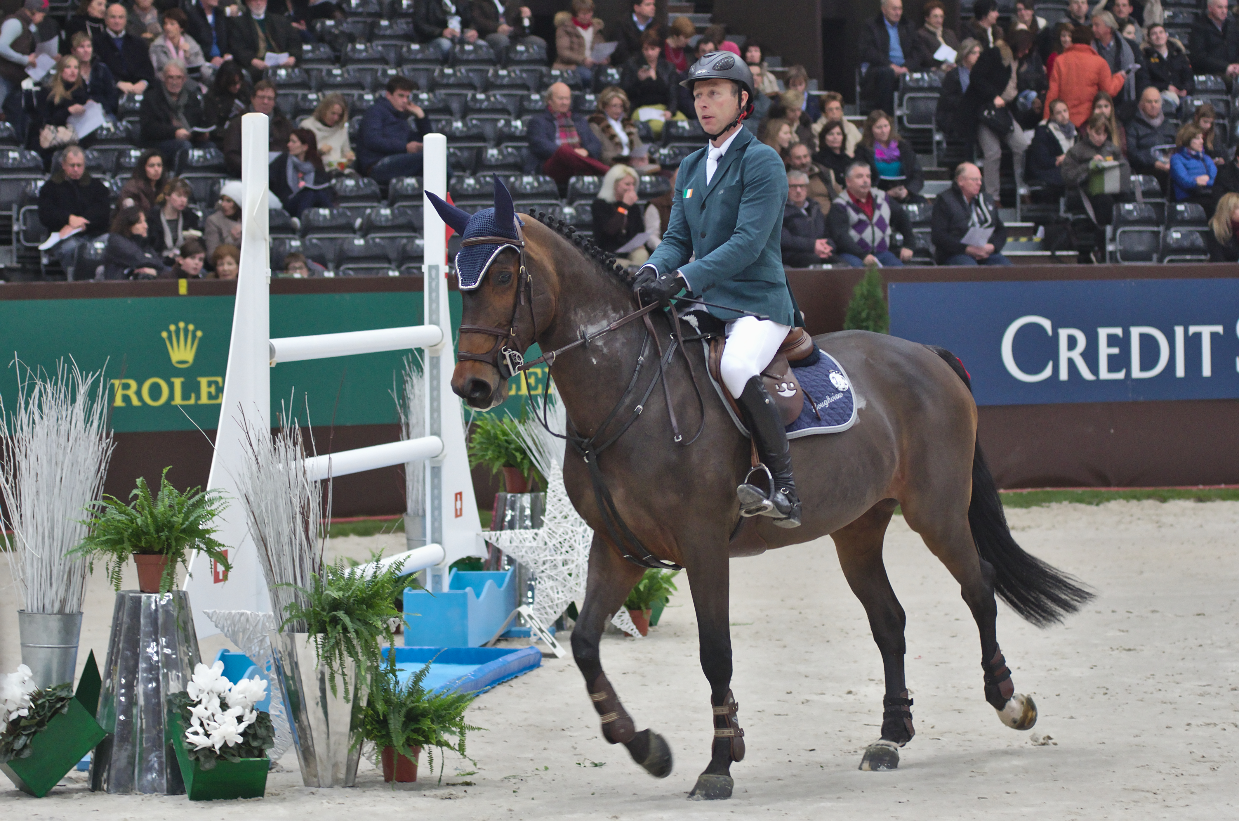 CHI Genève 2013 - 20131212 - Dermott Lennon et Loughview Lou-Lou